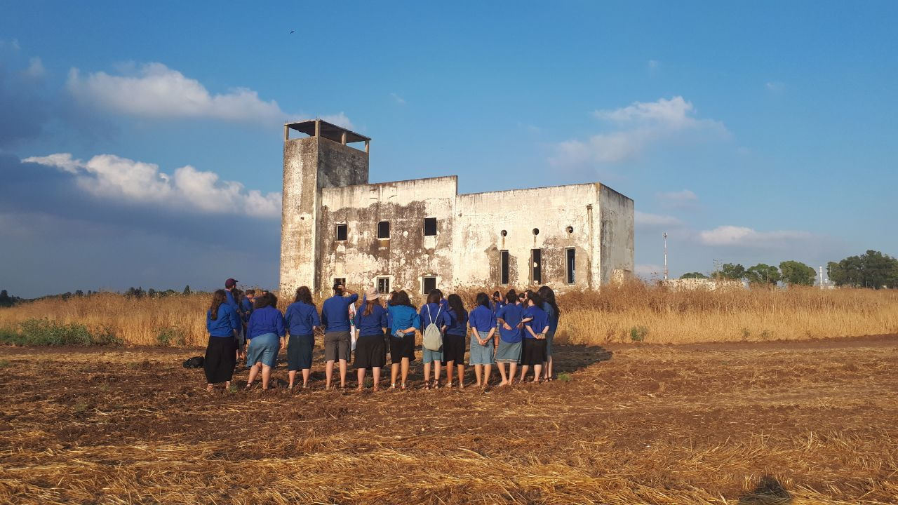 מרכזות התנועה על רקע מחנה ישראל